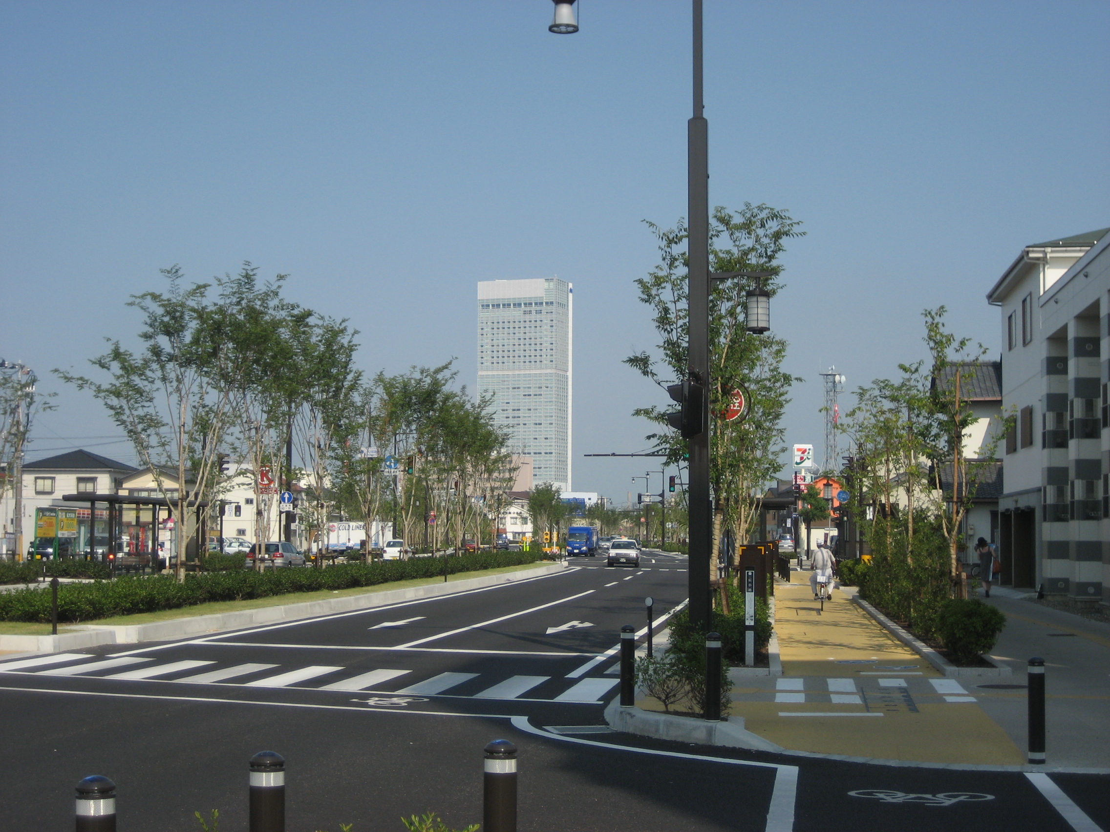 For Toki-messe